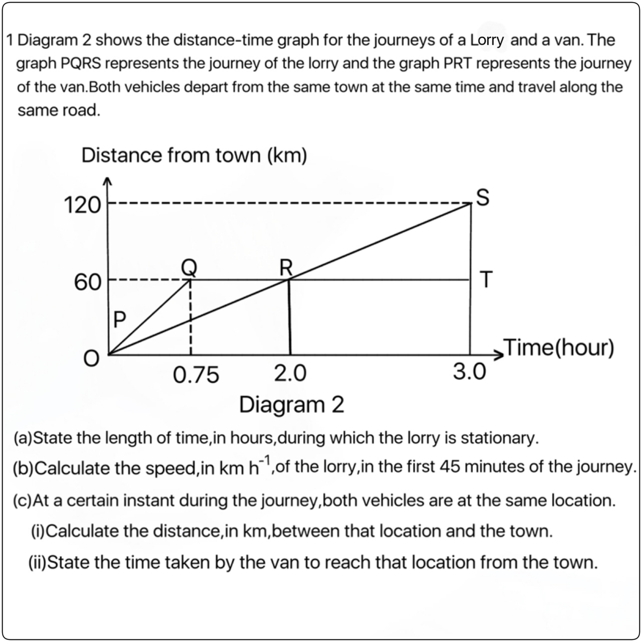 中文（中国大陆）: 一个复杂型数学题